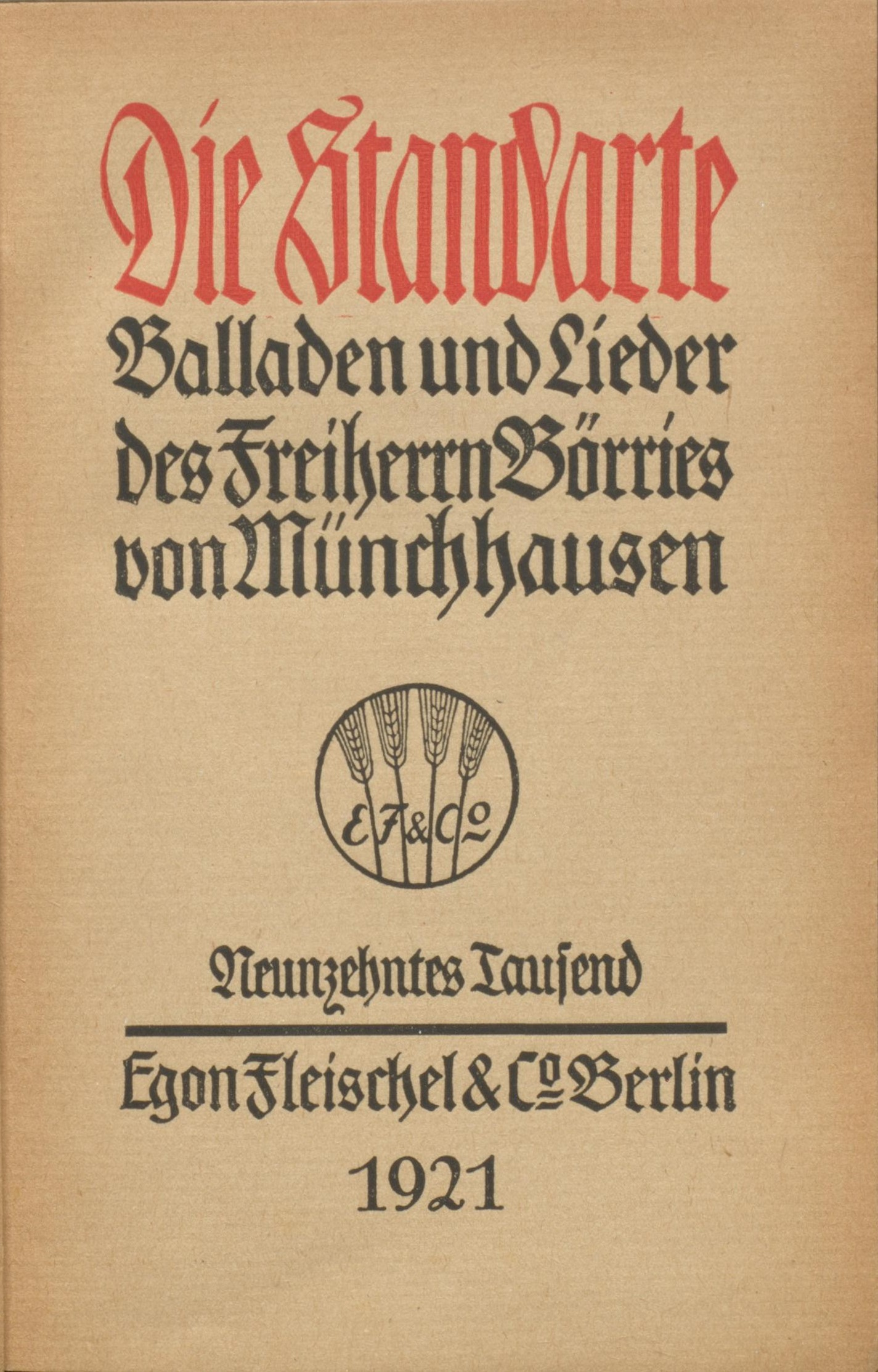 Börries von Münchhausen Die Standarte Egon Fleischel Berlin 1921 Titel